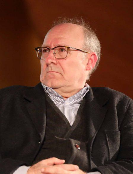 La filosofía vuelve a salir de las aulas para hacerse oír en los barrios de Madrid. Hoy martes, 29 de enero, ha arrancado el III Festival de Filosofía, que en su pasada edición contó con gran éxito de público y consiguió acercar a los madrileños y madrileñas la reflexión y el pensamiento crítico. En esta ocasión, se ha elegido el título ‘Zombis contra jabatos’ para ilustrar este ciclo de debates que corre a cargo de reputados filósofos, pensadores y críticos de la cultura y que se celebrará en varias bibliotecas municipales hasta el próximo mes de junio.